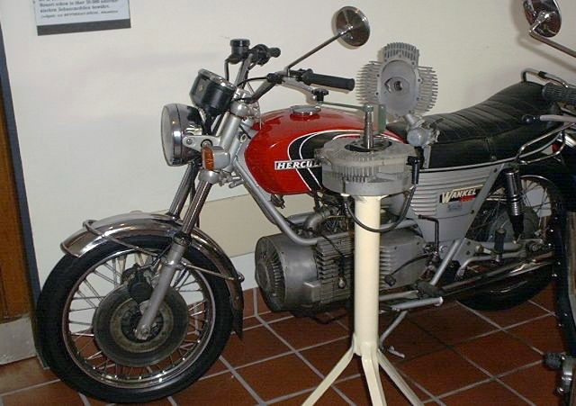 Hercules W2000, Motorradmuseum Ibbenbüren, eigenes Bild